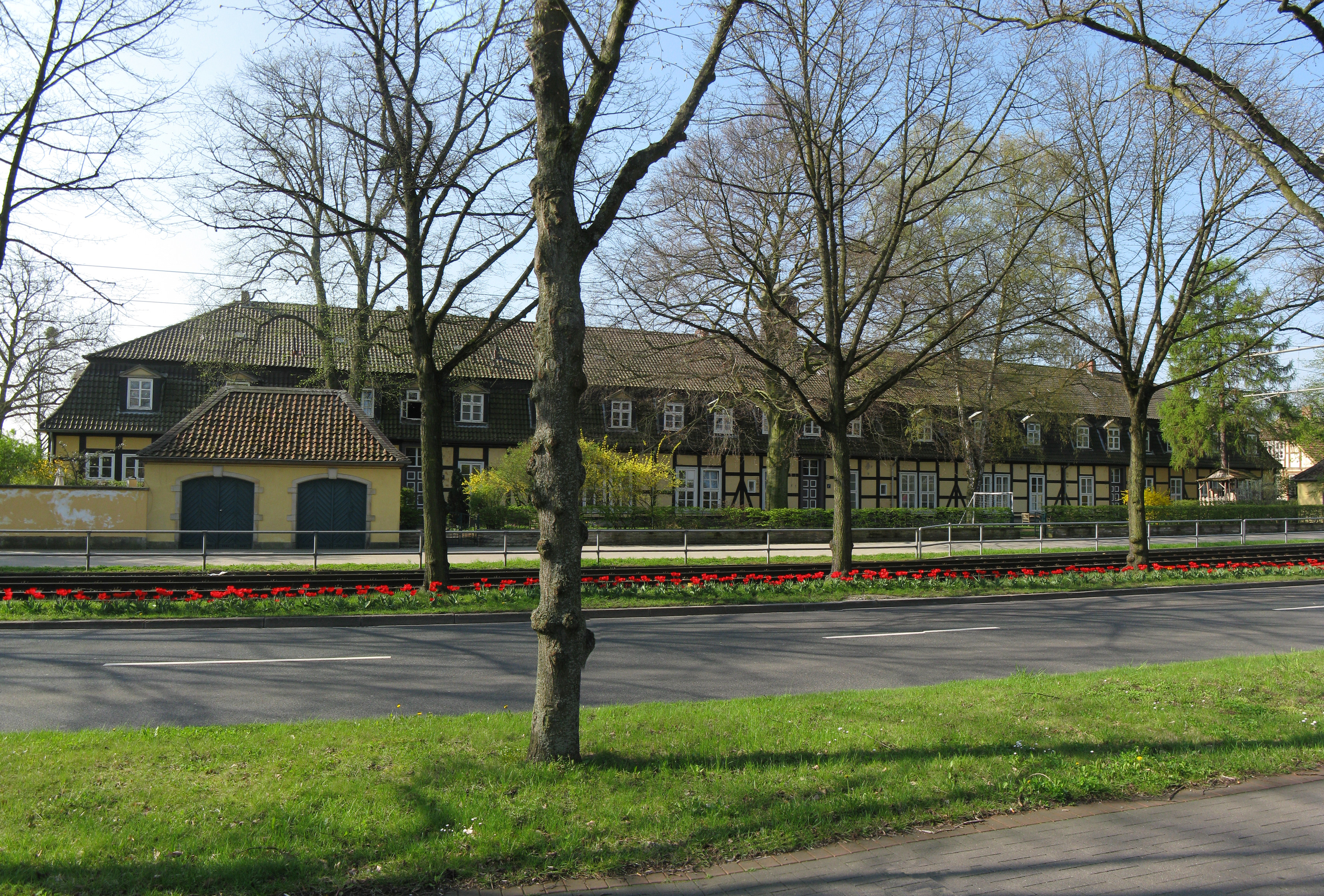 Hannover-Herrenhausen: Pagenhaus (Blick von der Herrenhäuser Straße)